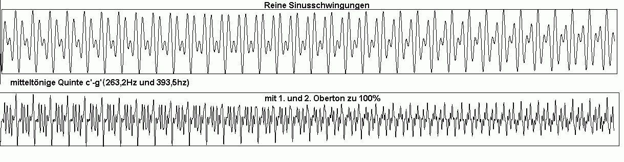 mitteltönige Qionten c'-g' (263,2Hz 393,5Hz) einmal als reine Sinusschwingungen, dann mit 1. und 2. Obertön zu je 100%